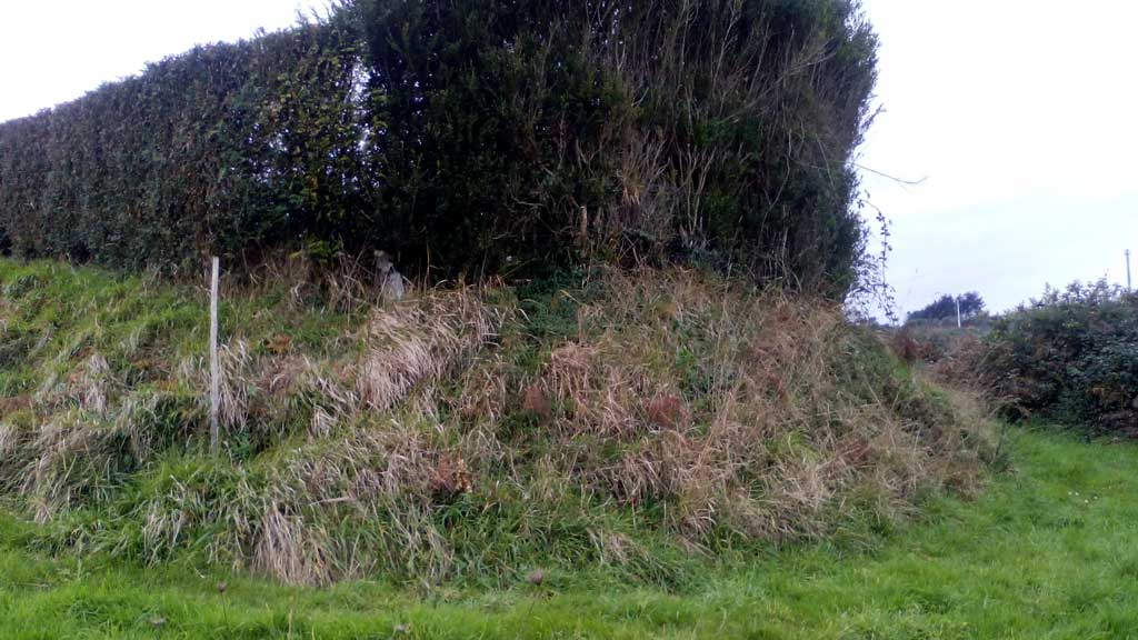 Castro da Lagoa.